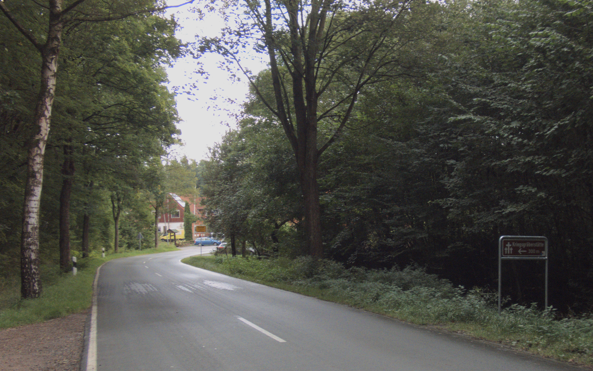 Wegweiser zur Kriegsgräberstätte an der Kreisstraße westlich des Ortsrands von Nienstedt in Niedersachsen